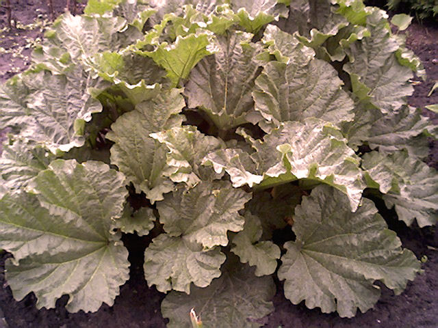 Rabarber. Serie foto's van een rabarberplant van 25 maart 2005 tot en met 13 mei 2005, één foto per week. Bestandsnamen: Rabarber-serie-1.jpg tot Rabarber-serie-8.jpg. Foto zelf gemaakt. Public Domain.